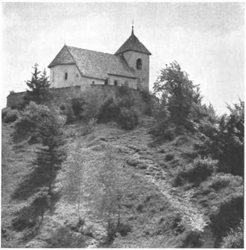 Sv. Lovrenc na Polhograjski gori.